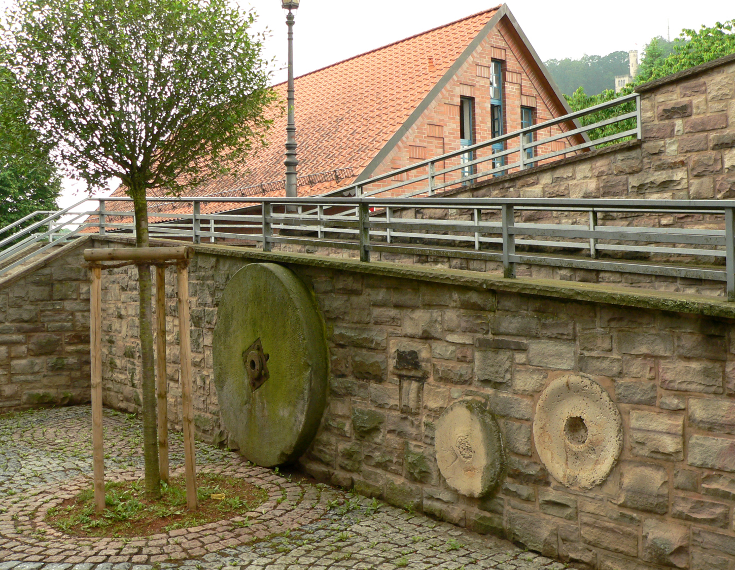 Mühlsteine der Graumühle, aufgestellt nahe dem früheren Standort der Mühle am Aufgang der Mühlenbrücke über den Eselswerder